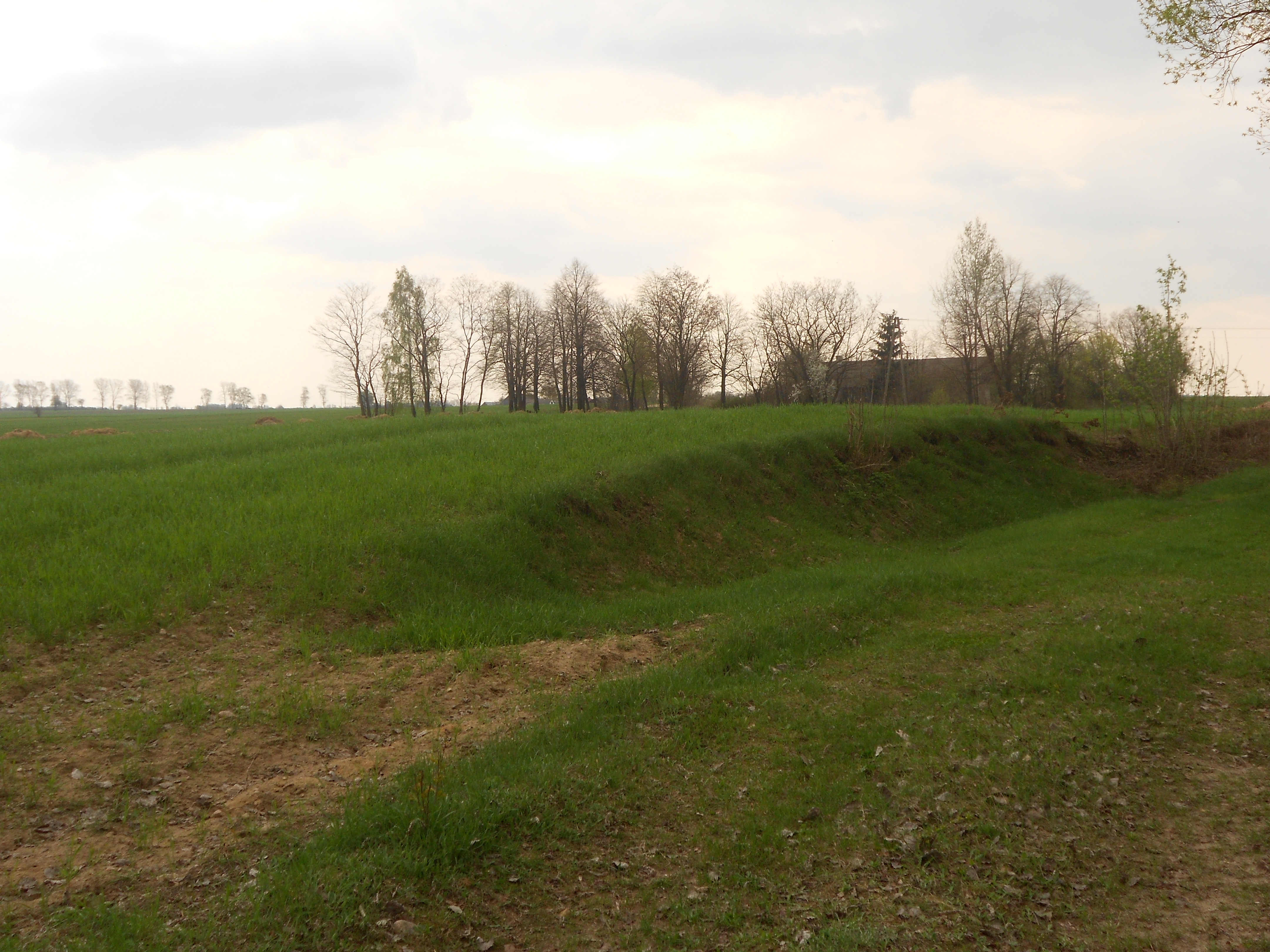 Pagórek na którym zlokalizowany był cmentarz osadników